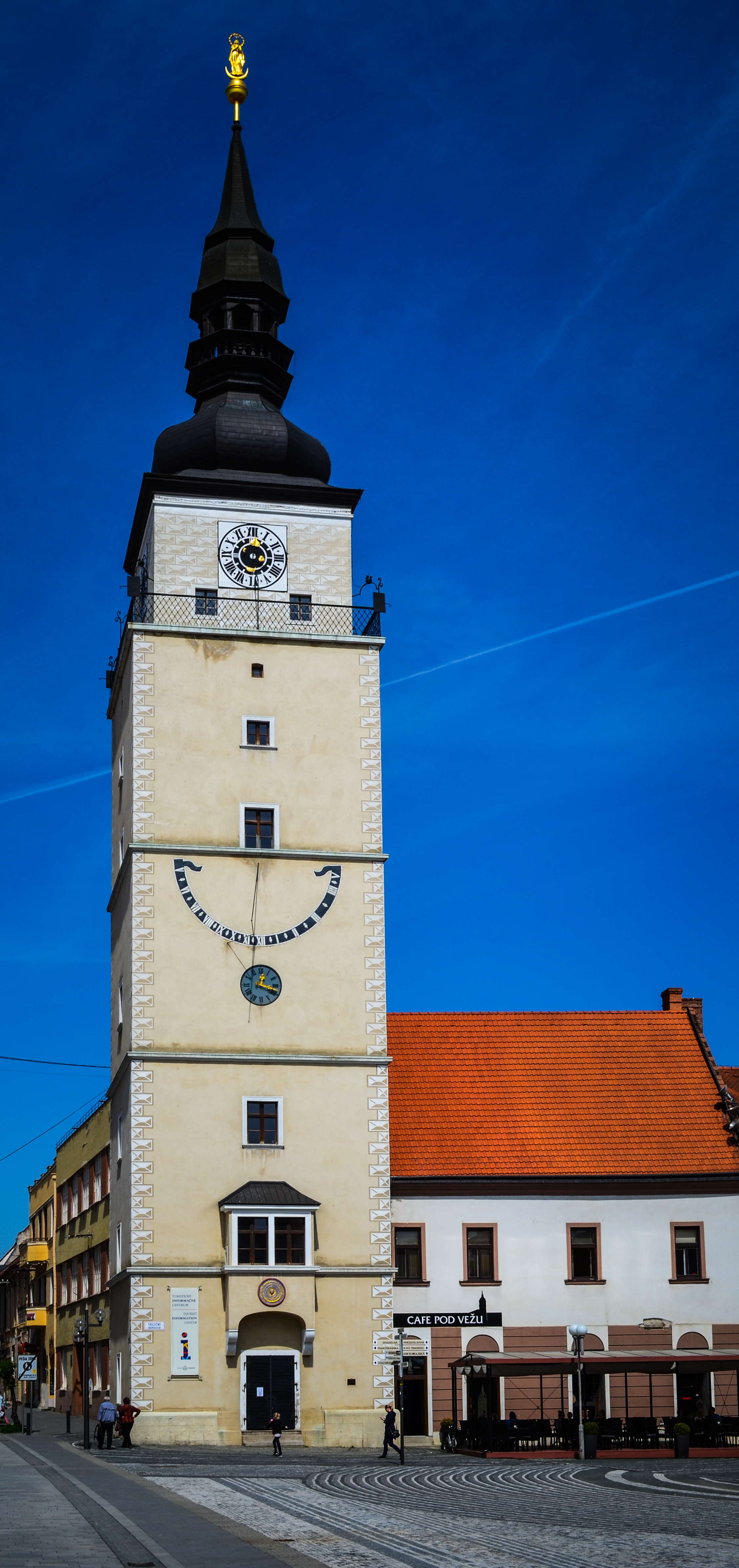 Mestska veza Trnava